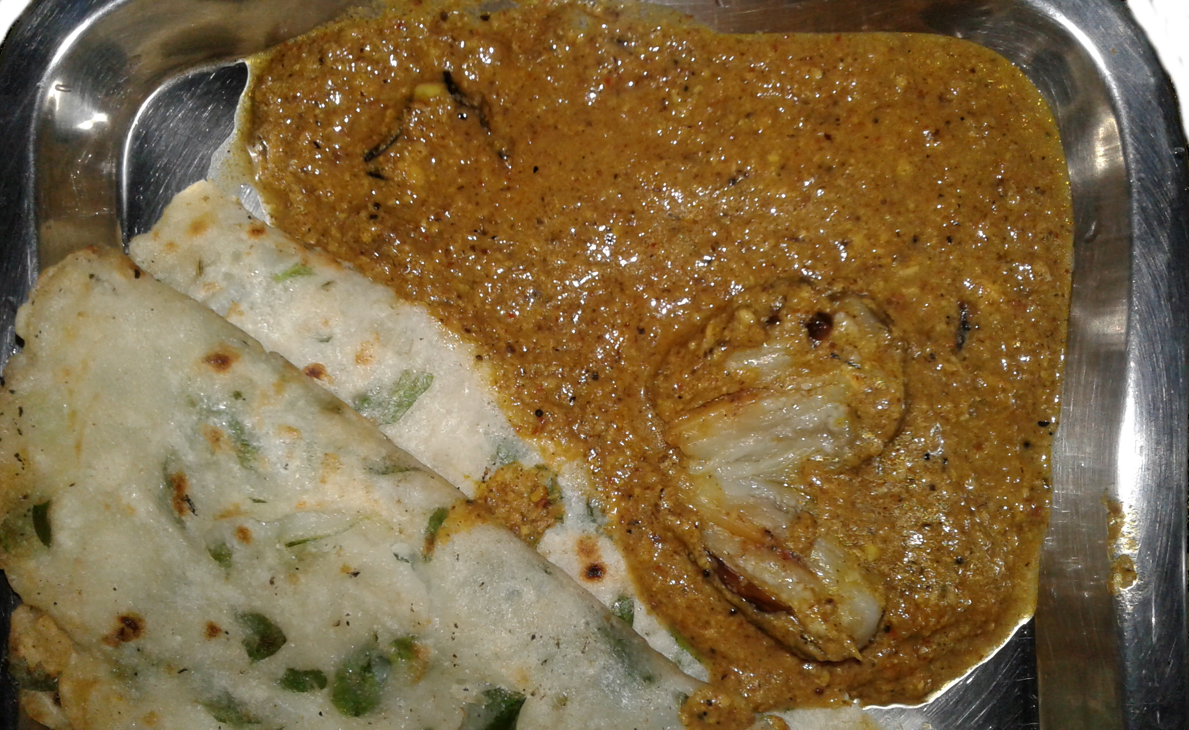 ಕನ್ನಡ: ಬದನೆ ಎಣ್ಣೆಗಾಯಿ - ಅಕ್ಕಿ ರೊಟ್ಟಿ